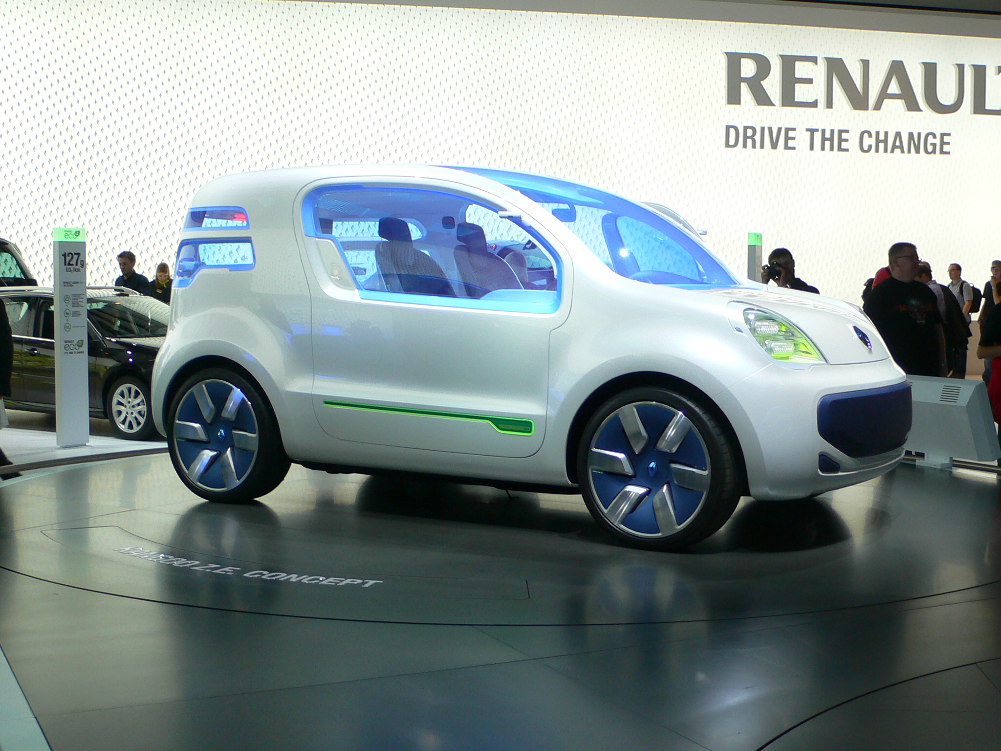 Renault Kangoo Z.E. Concept